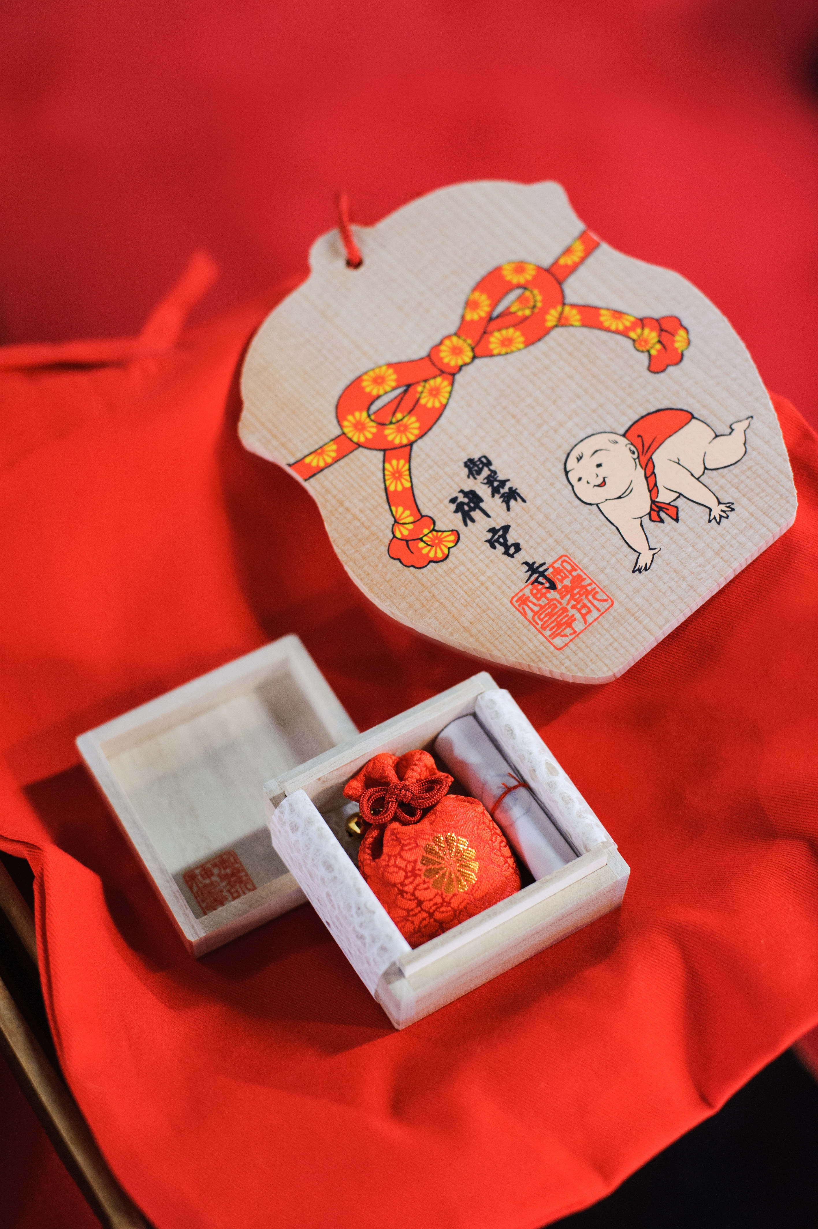 てがた絵馬（奉納時に朱肉で手形をおす）と藥壺御守